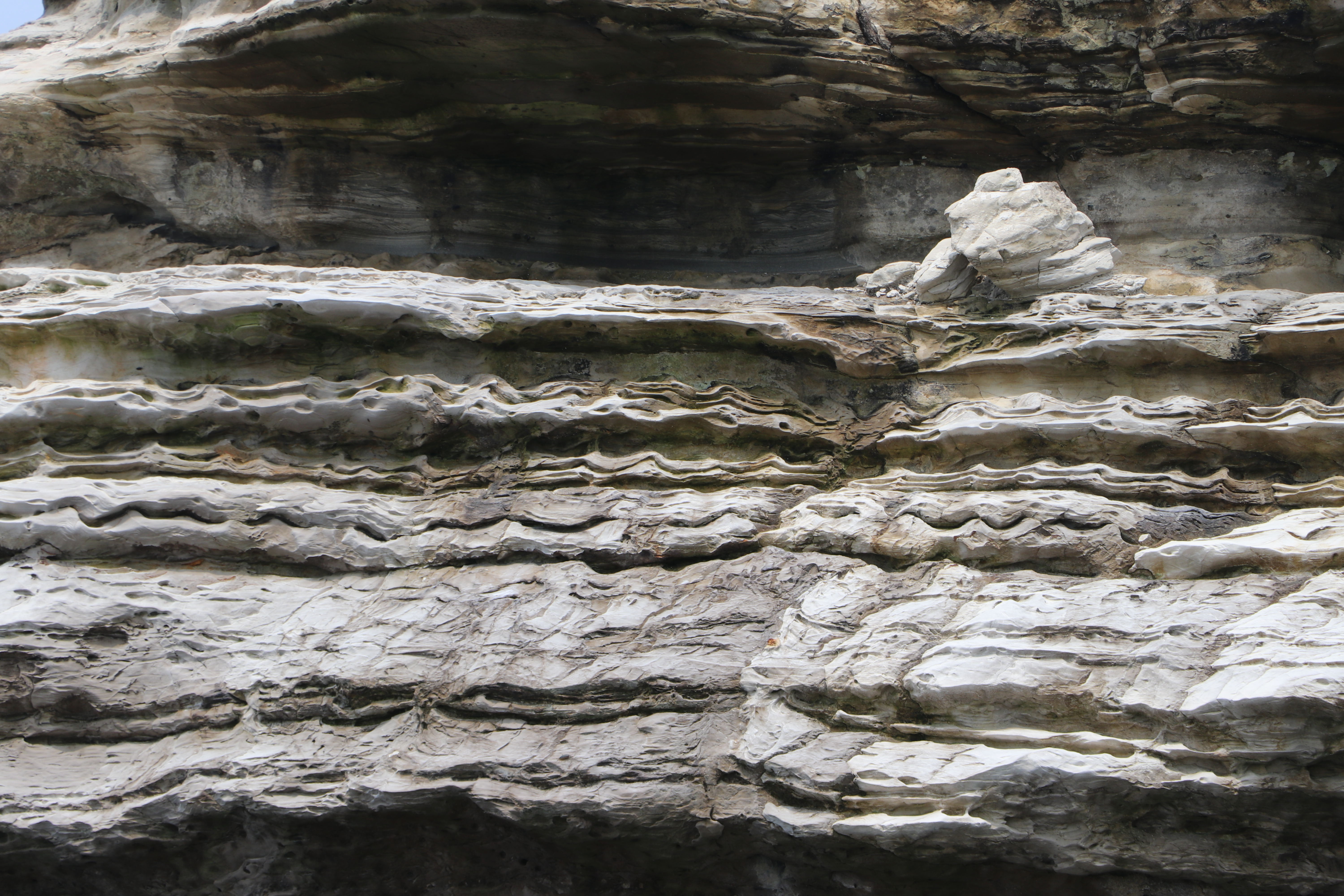 神奈川県三浦市二町谷で観察可能な漣痕